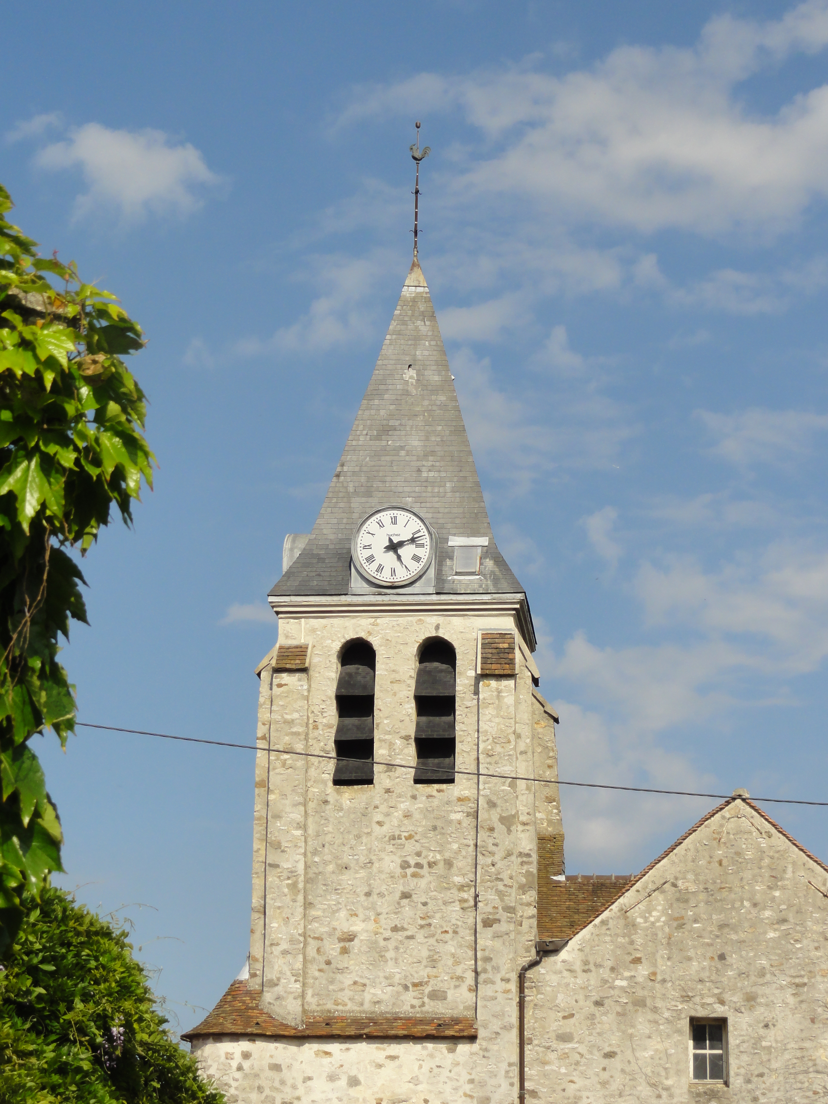 Clocher.